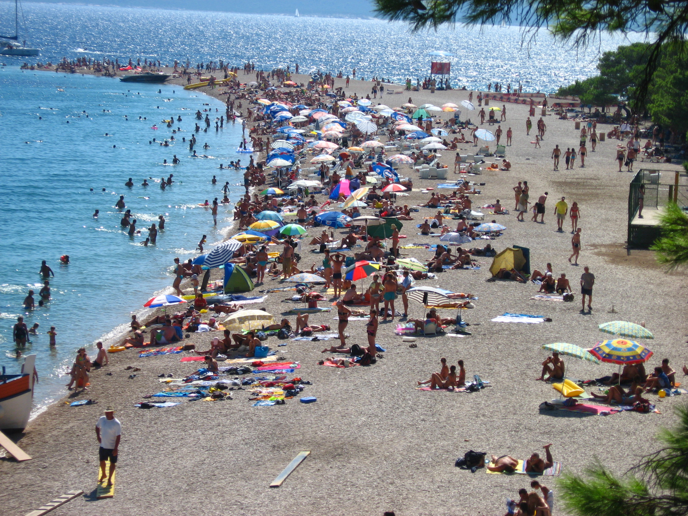 Zlatni Rat2